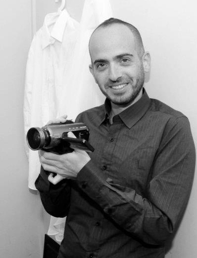 שחר ברלוביץ'